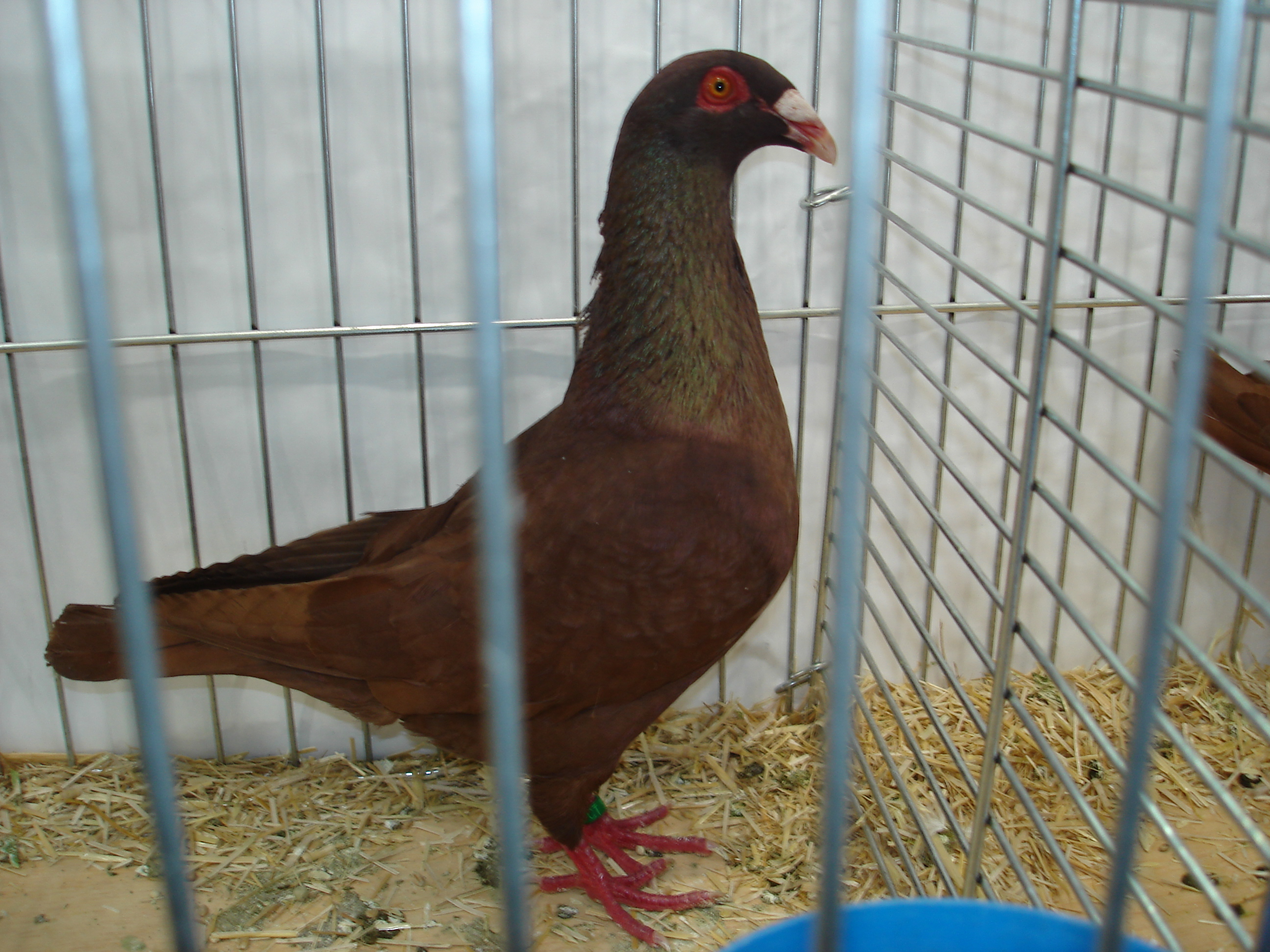 Zdjęcie rasy gołębia - hiszpan